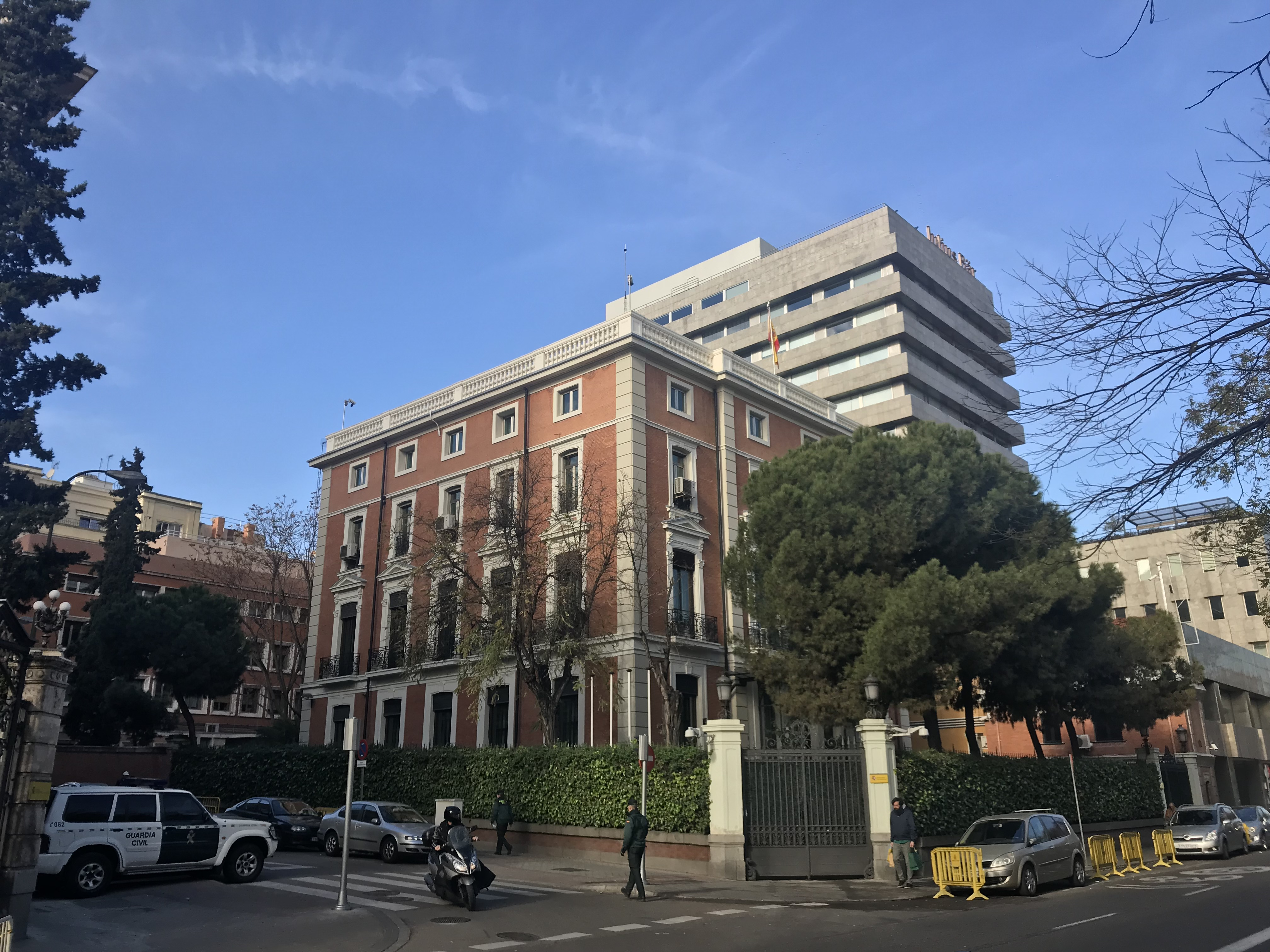 Palacio de los Condes de Casa Valencia, Madrid